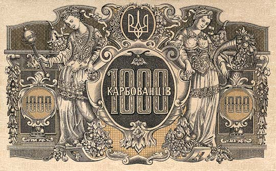 1000 карбованцев УНР 1918. Аверс.